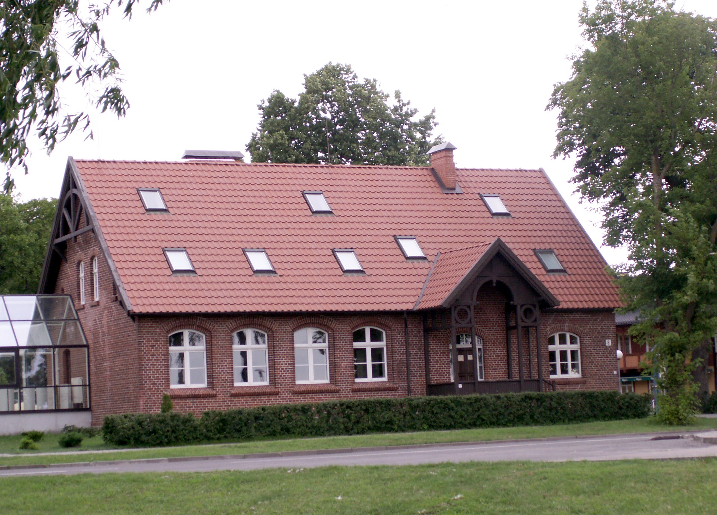 Juodkrantės Liudviko Rėzos jūrų kadetų mokykla